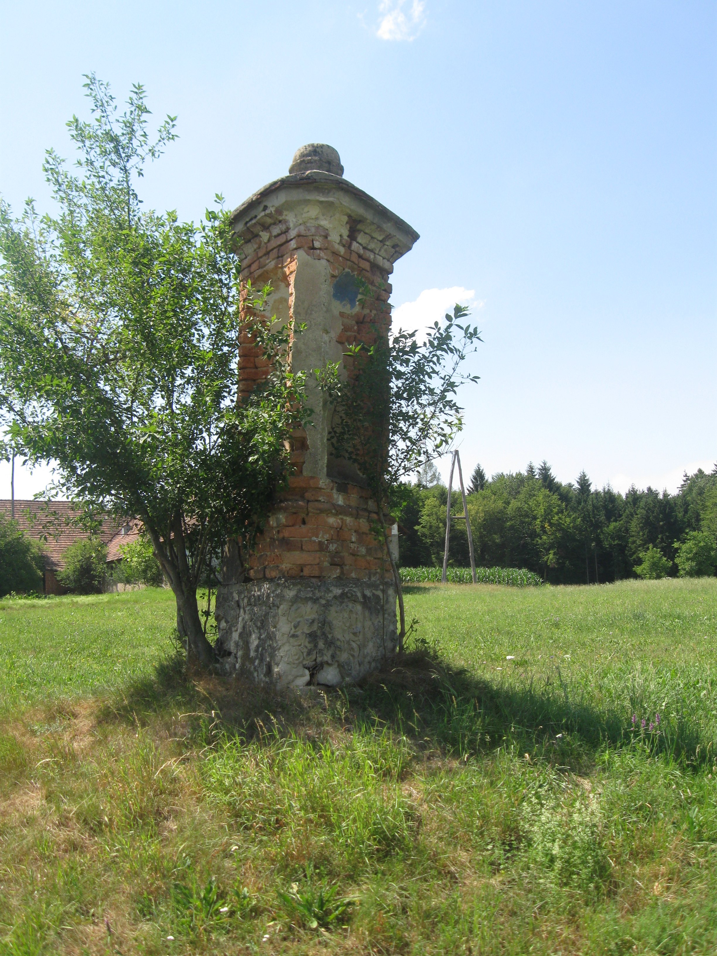 Trikotno zidano znamenje z opečnato streho, stoječe na kamnitem podstavku. 19. stoletje.